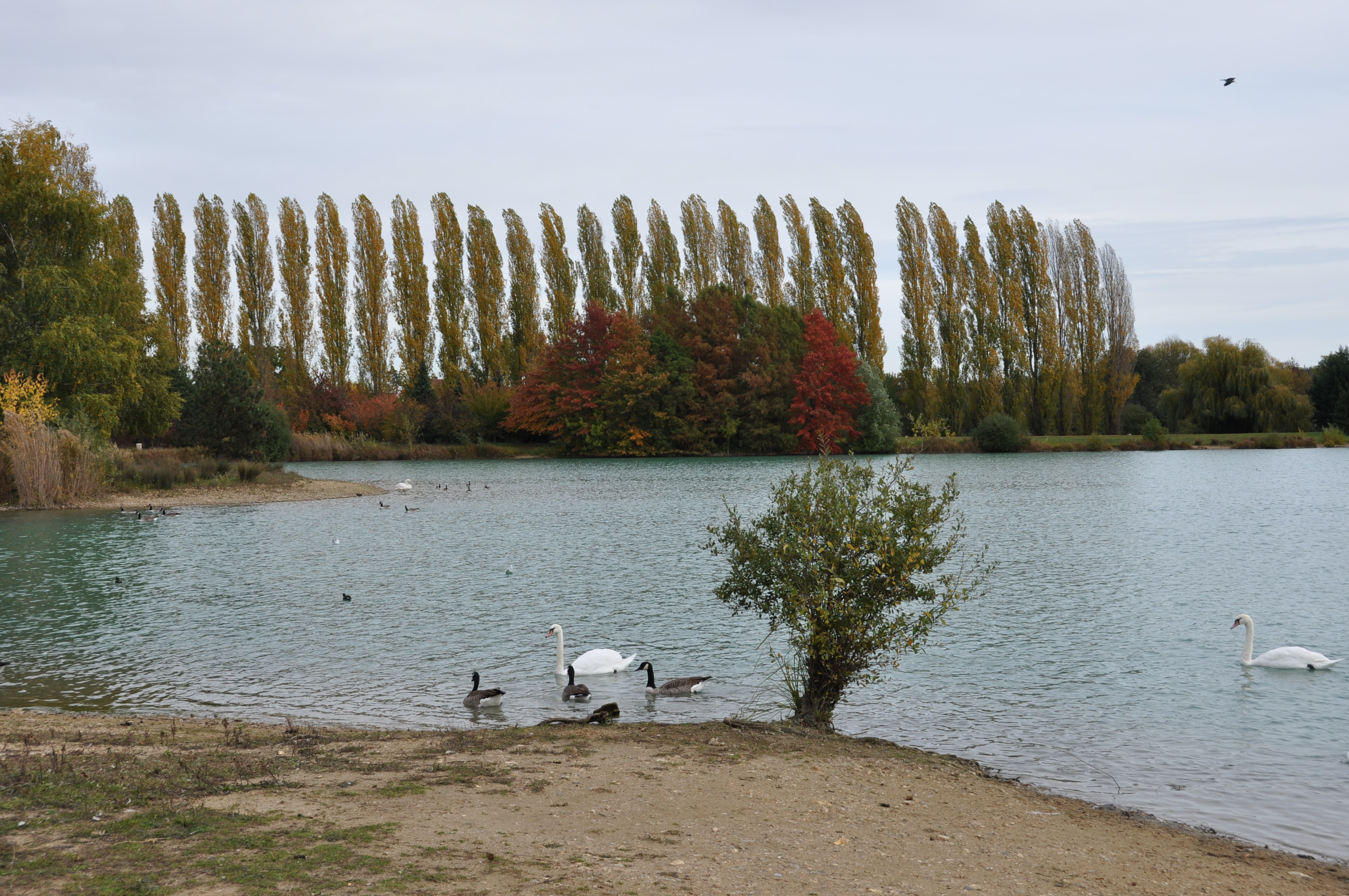 Lac de Chalette (Loiret, France).